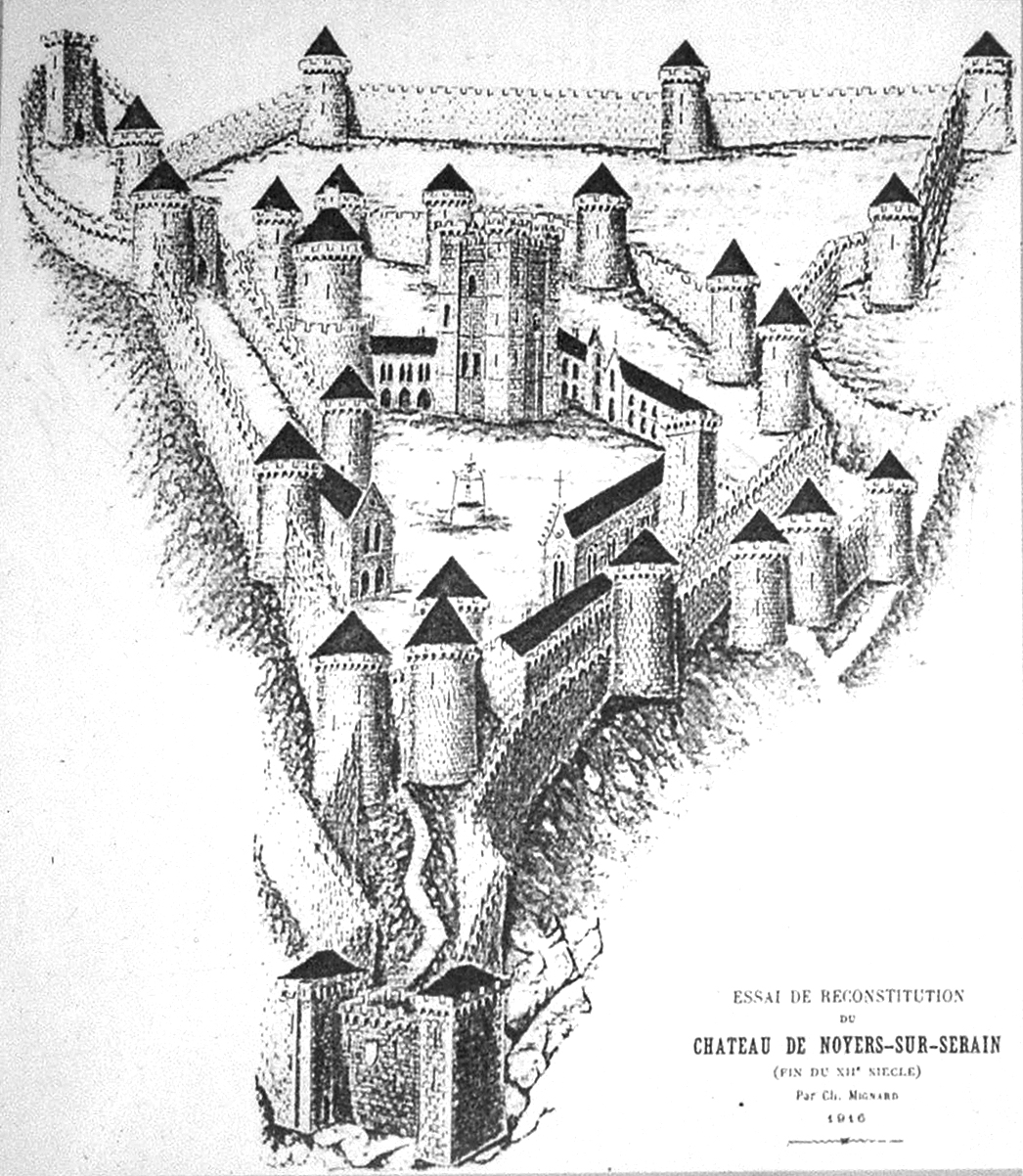 Reconstitution du château de Noyers (Yonne), par l'abbé Alexandre Parat et Charles Mignard